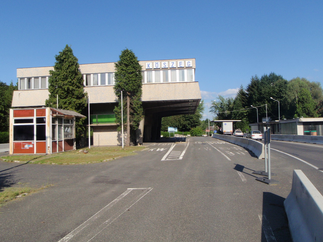 Güns, ehemaliger Grenzübergang in den Schengenraum, 87. Ungarische Bundesstraße